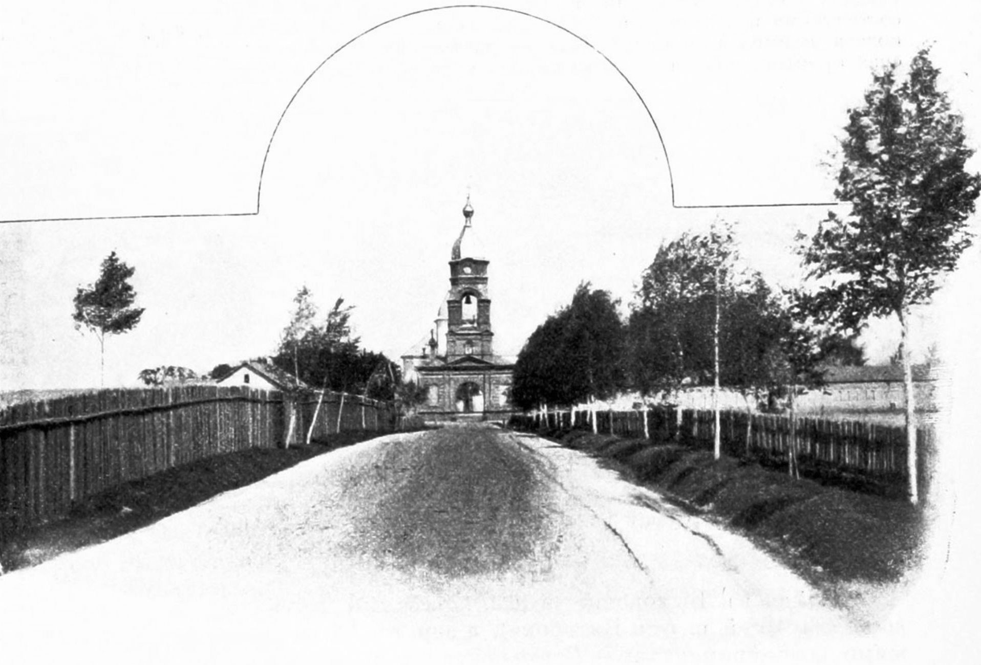 Беларуская (тарашкевіца): Буйнічы (Bujničy)